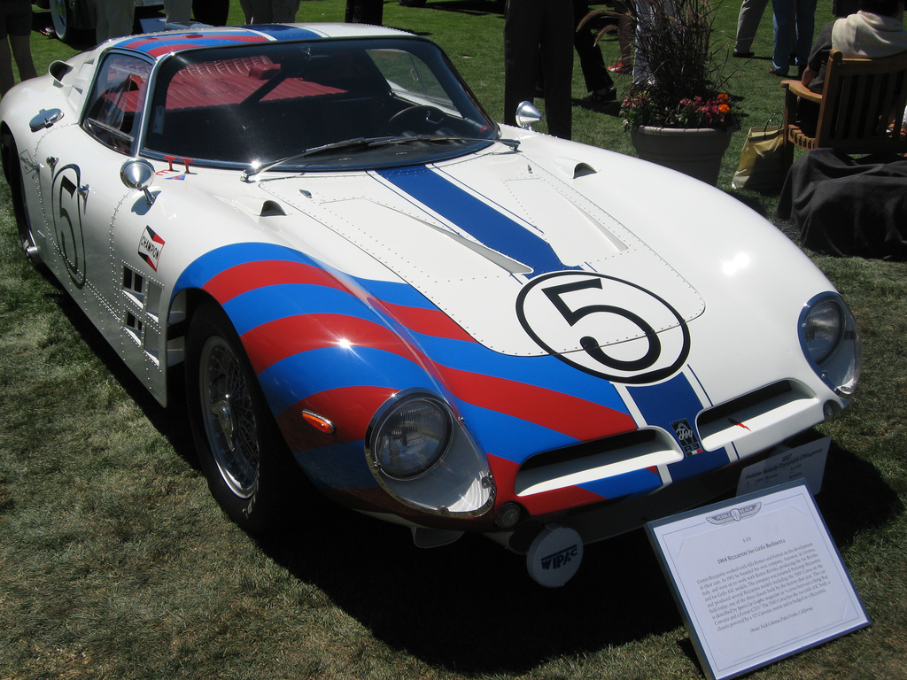 1964 Bizzarini Iso Grifo Berlinetta 5300 CorsaPebble Beach Concours d'Elegance